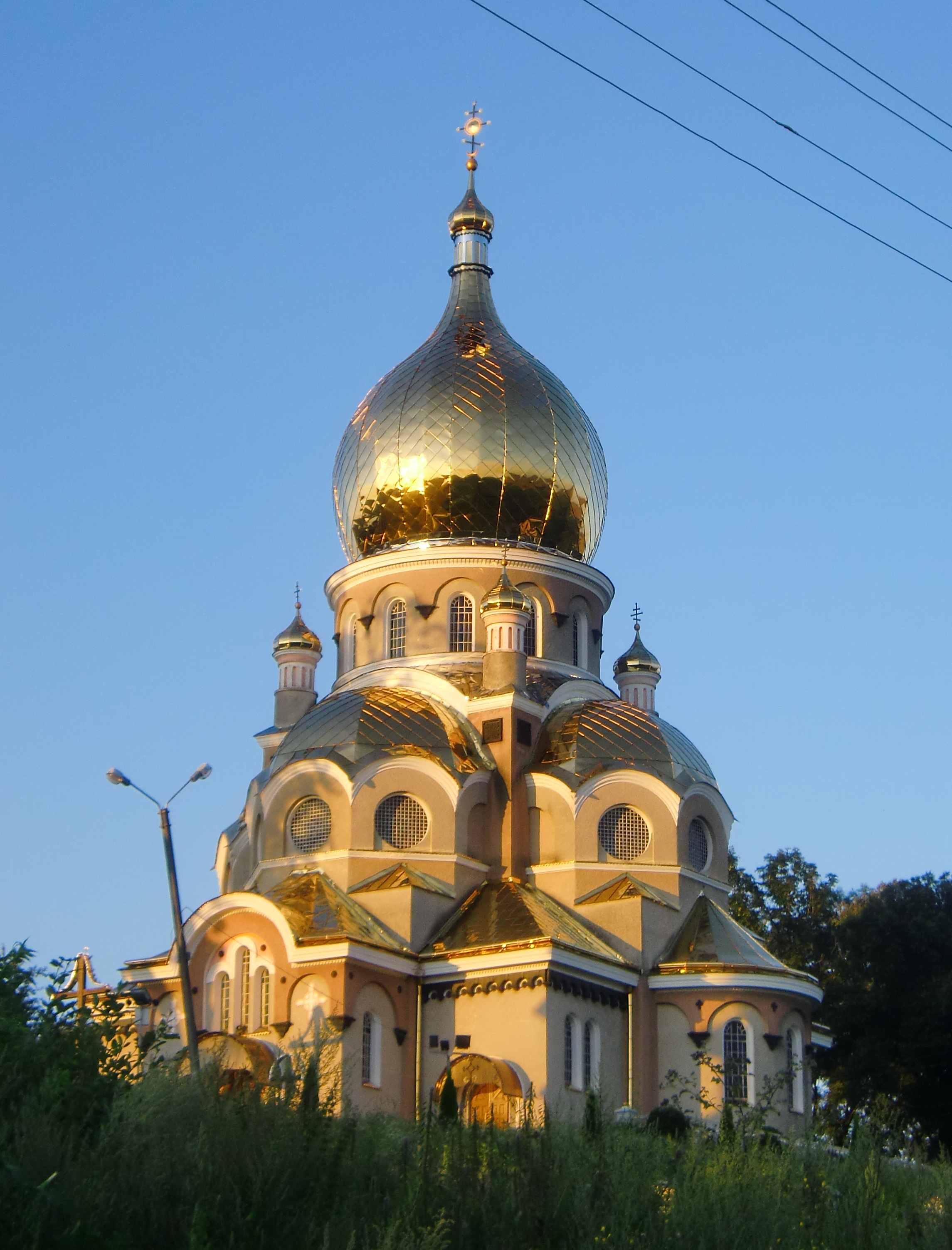 Храм св.Бориса і Гліба в с.Тучапи